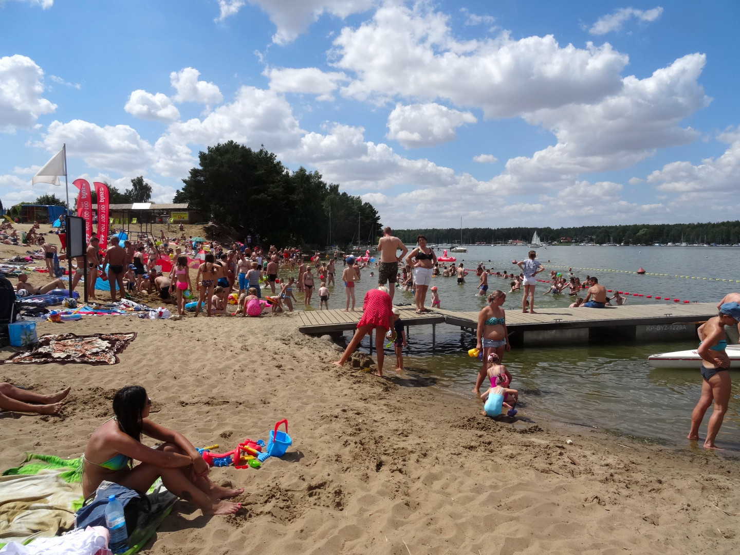 Plaża w Pieczyskach nad Zalewem Koronowskim